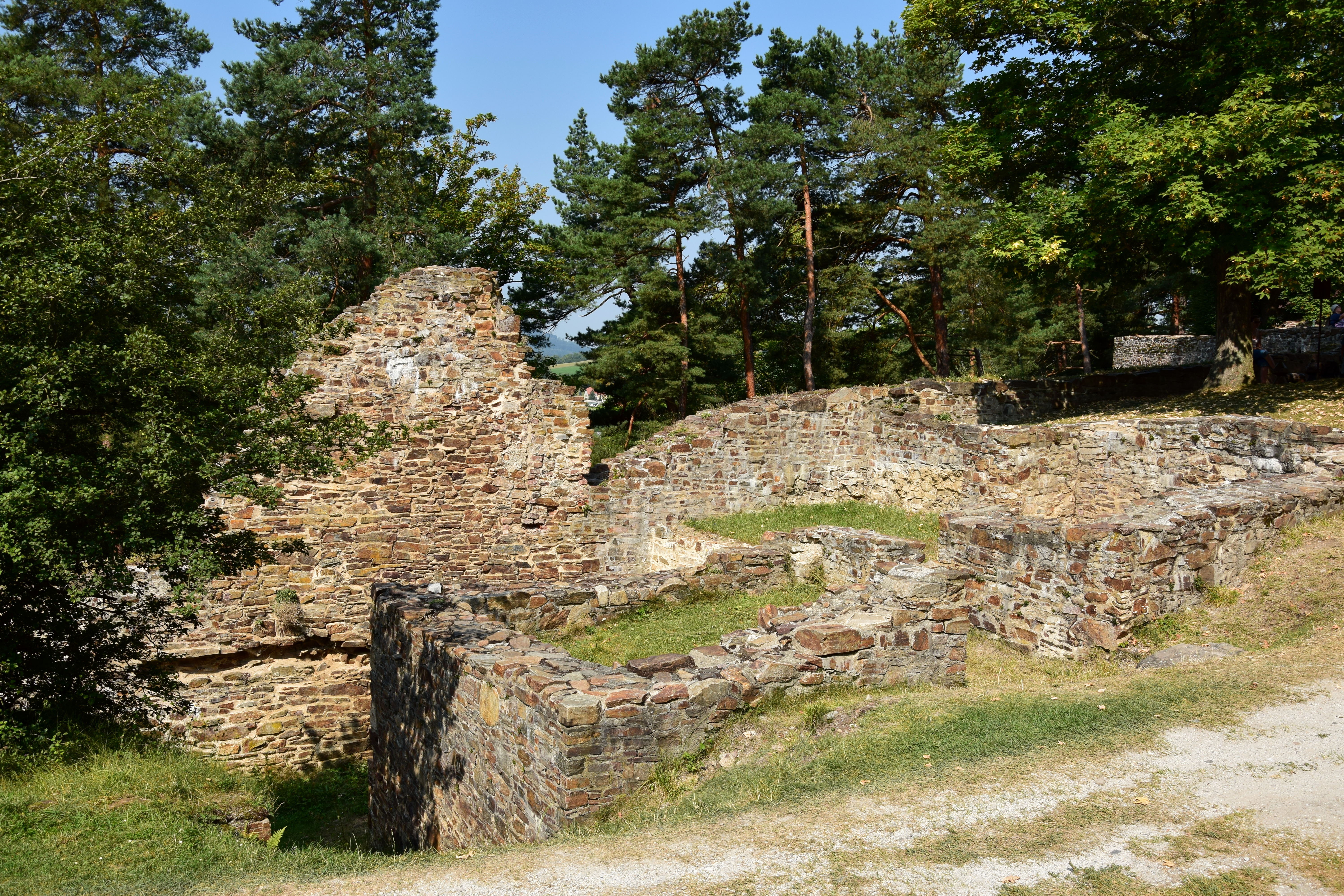 Velhartice – torzo hospodářských budov (vinopalna)